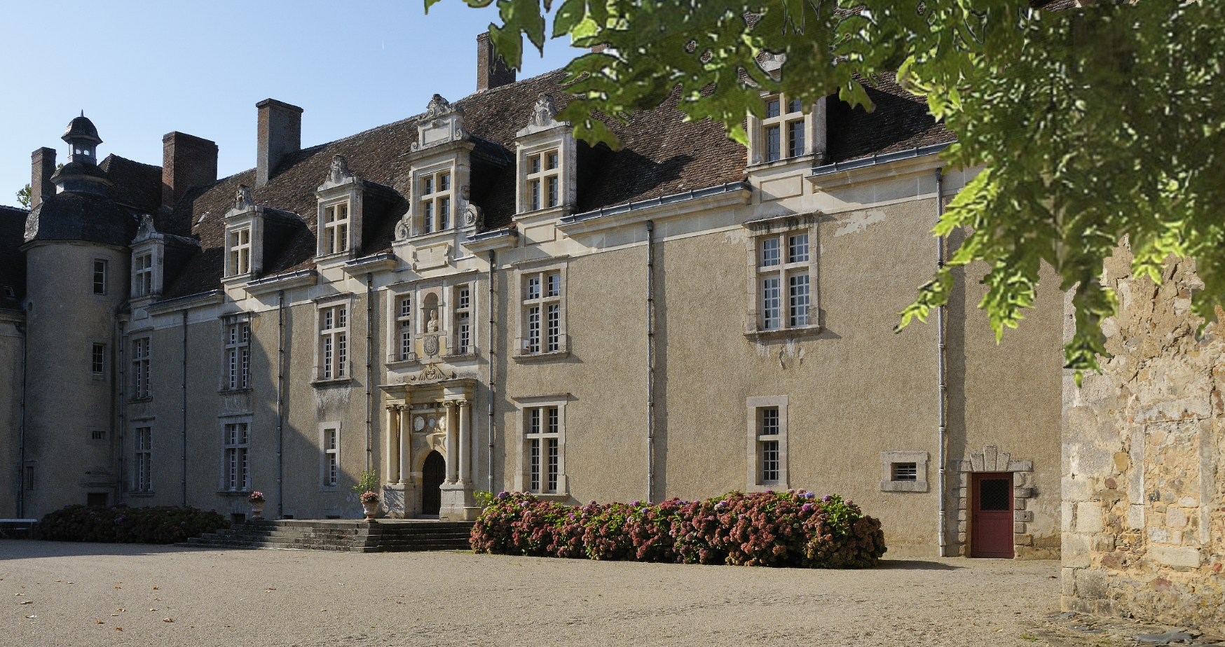 le corps de logis principal, et la cour d'honneurs, encadrent la porte d'entrée Renaissance.